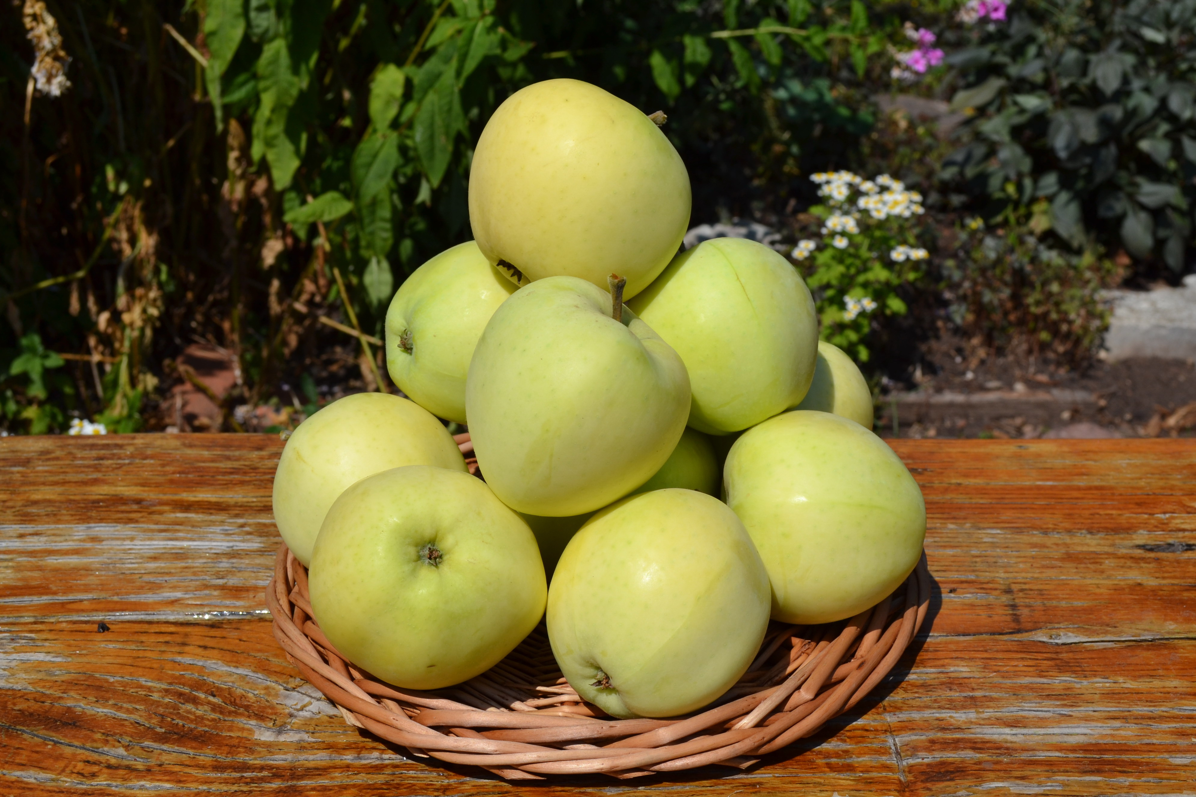 Снимок сделан в августе 2016 г. в деревне Богдановка Иглинского района Башкирии. На снимке отраженна характерная особенность плодов Папировки - шовчик.